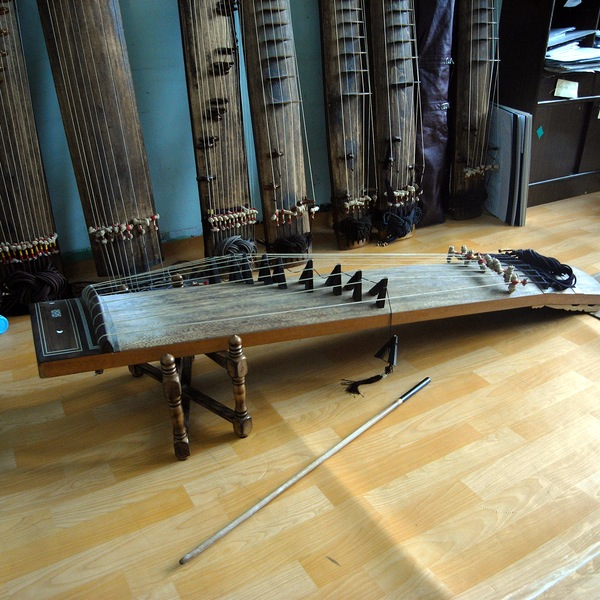 정악 연주용 아쟁. 사진 하단의 긴 막대기로 켜서 소리를 낸다.